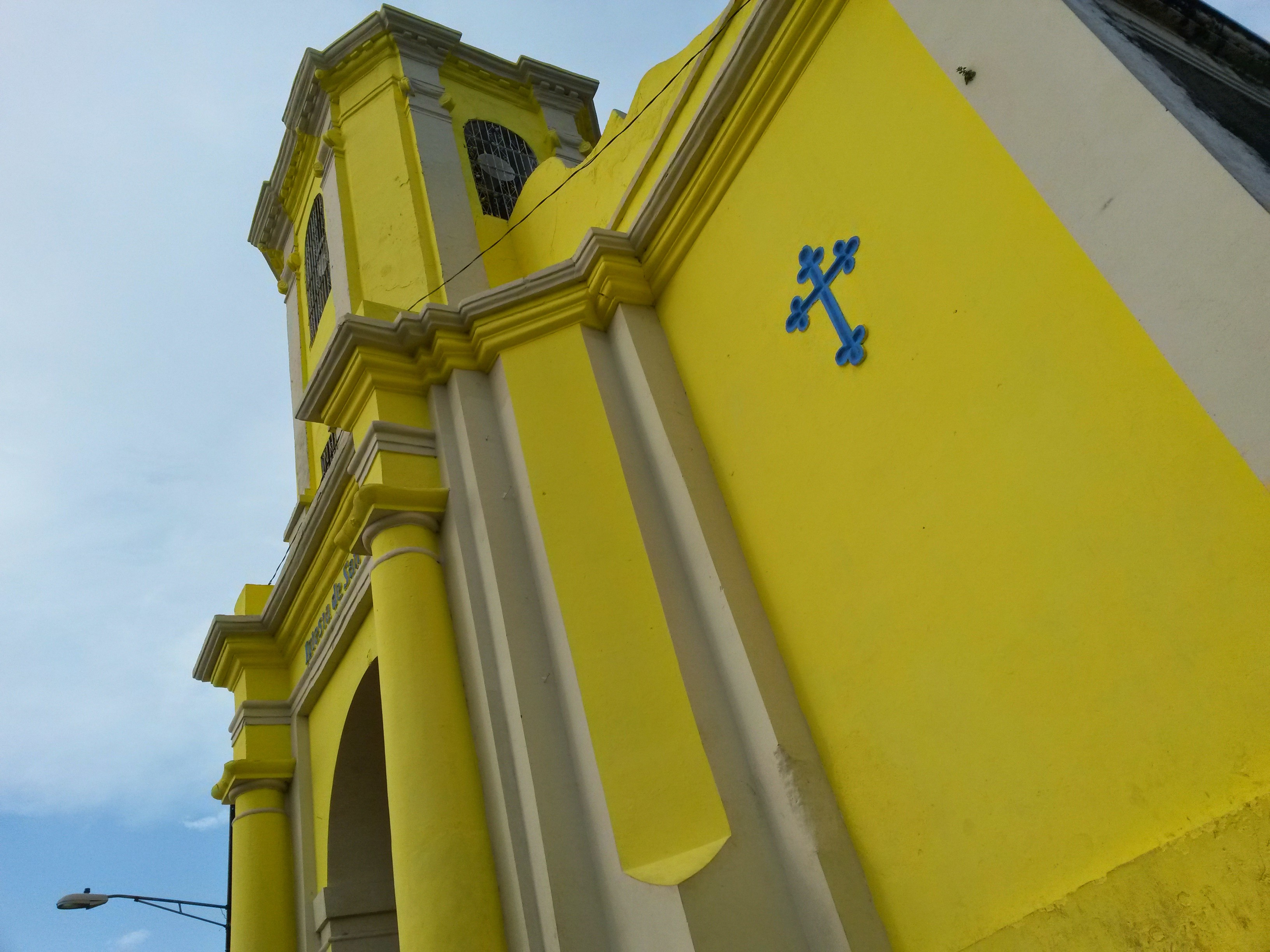 Iglesia San Blas Tambien Virgen De Candelaria